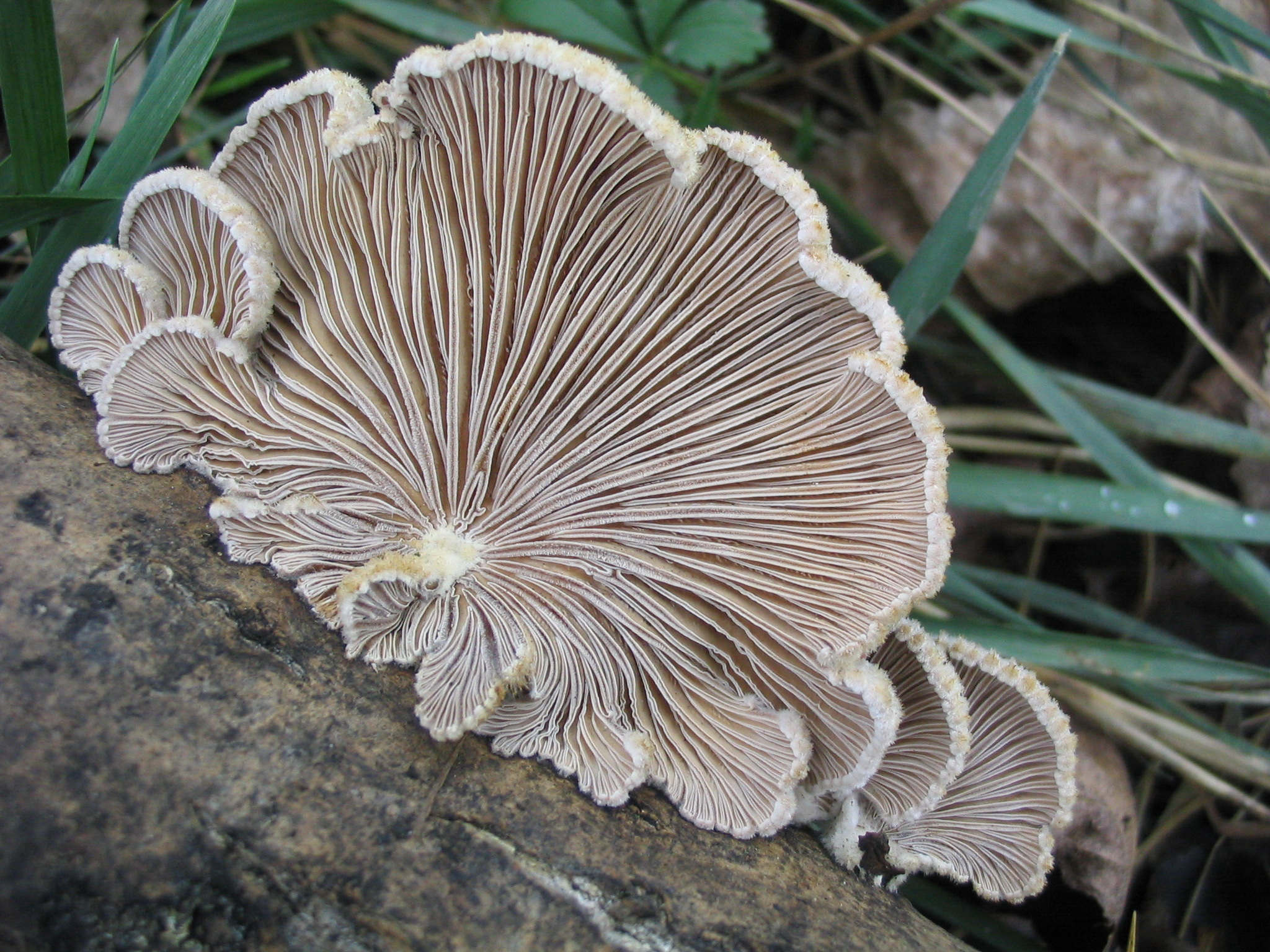 Spaltblättling, Schizophyllum commune an Laubholz (Pappel) aufgenommen am 28.01.2007 in der Rheinaue bei Ingelheim von Dr. Hagen Graebner